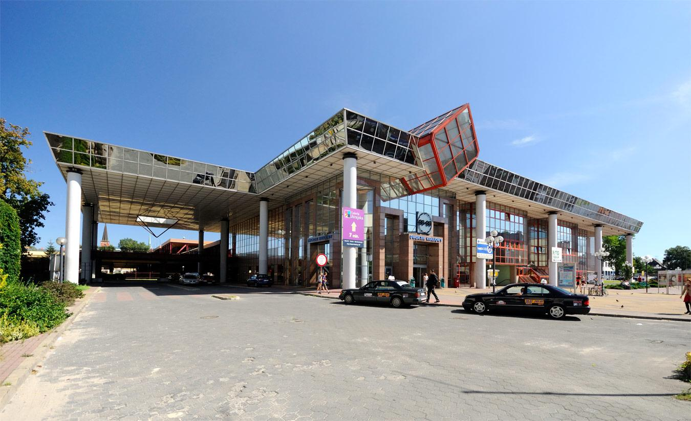 Częstochowa Osobowa - to chyba najnowszy budynek dworca w Polsce.